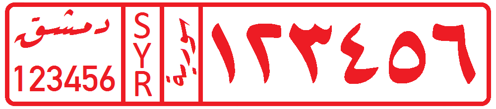 نمونه پلاک سوریه